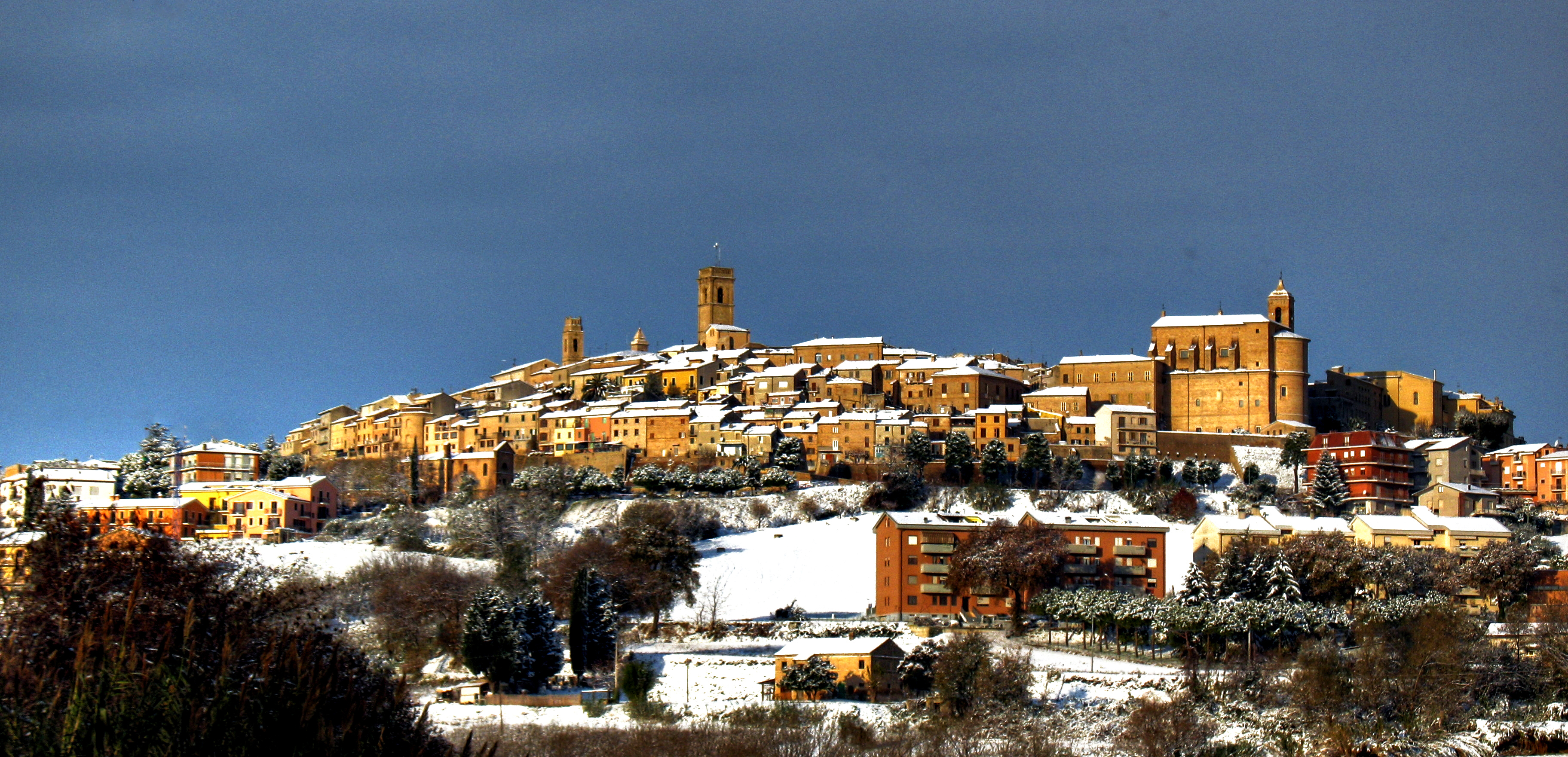 Vista del paese di Potenza Picena (Marche, Italia).